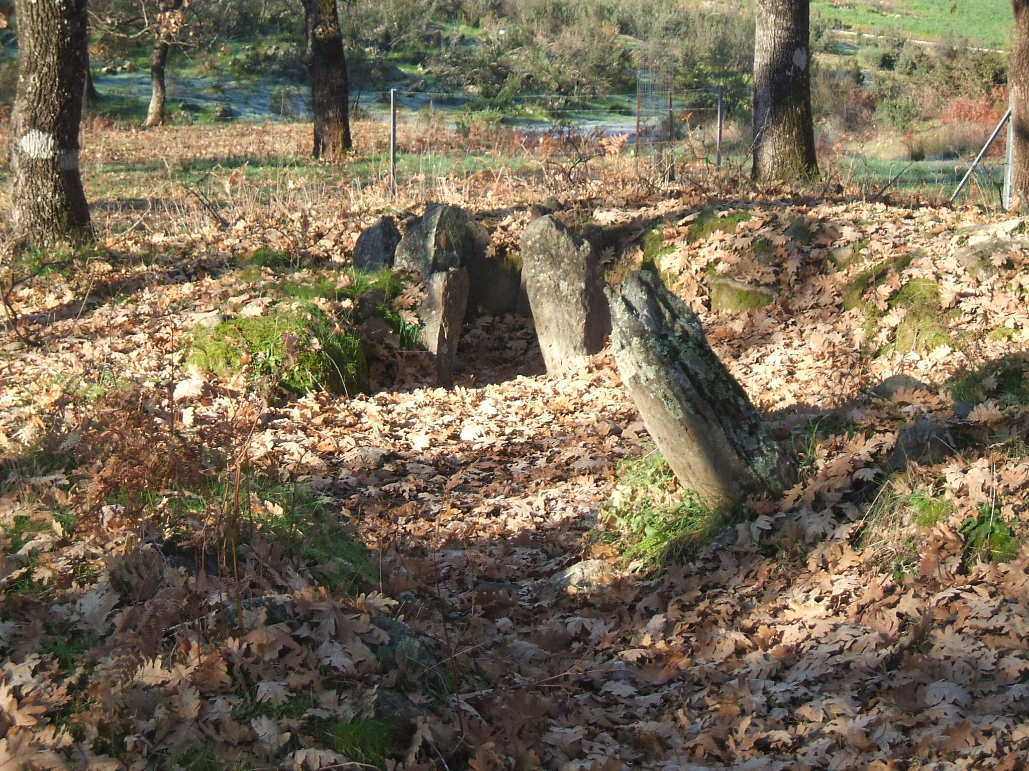 El Dolmen del Matón se encuentra en la Dehesa Boyal del municipio de Hernán-Pérez (Cáceres, España)